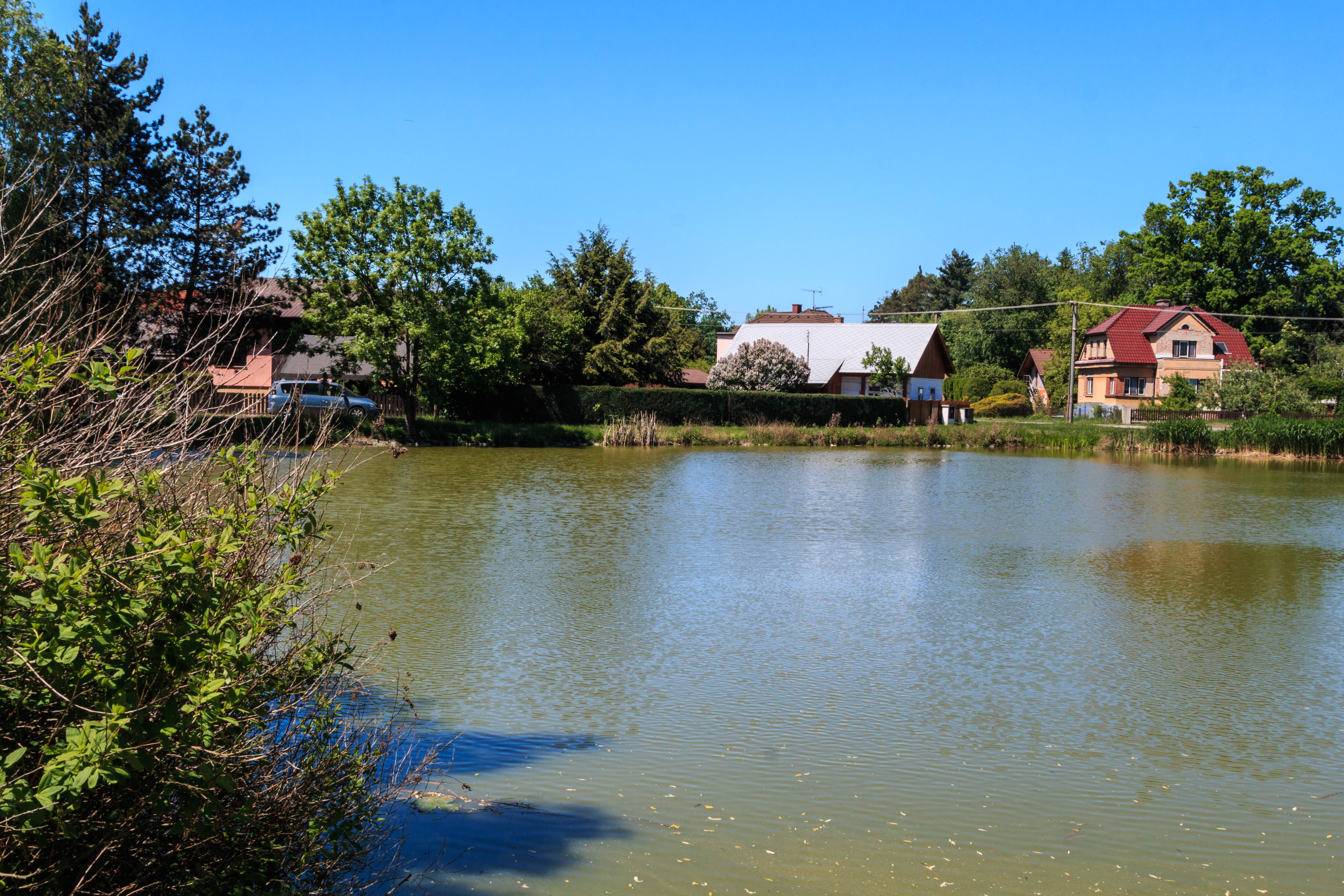 Rybník Na Sádkách ve Svinarech Project: Vodstvo.